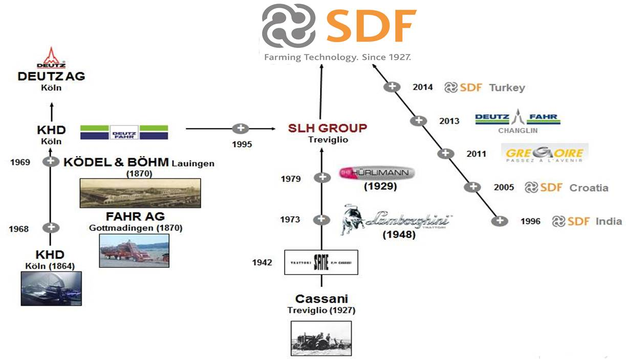 History of Deutz-Fahr